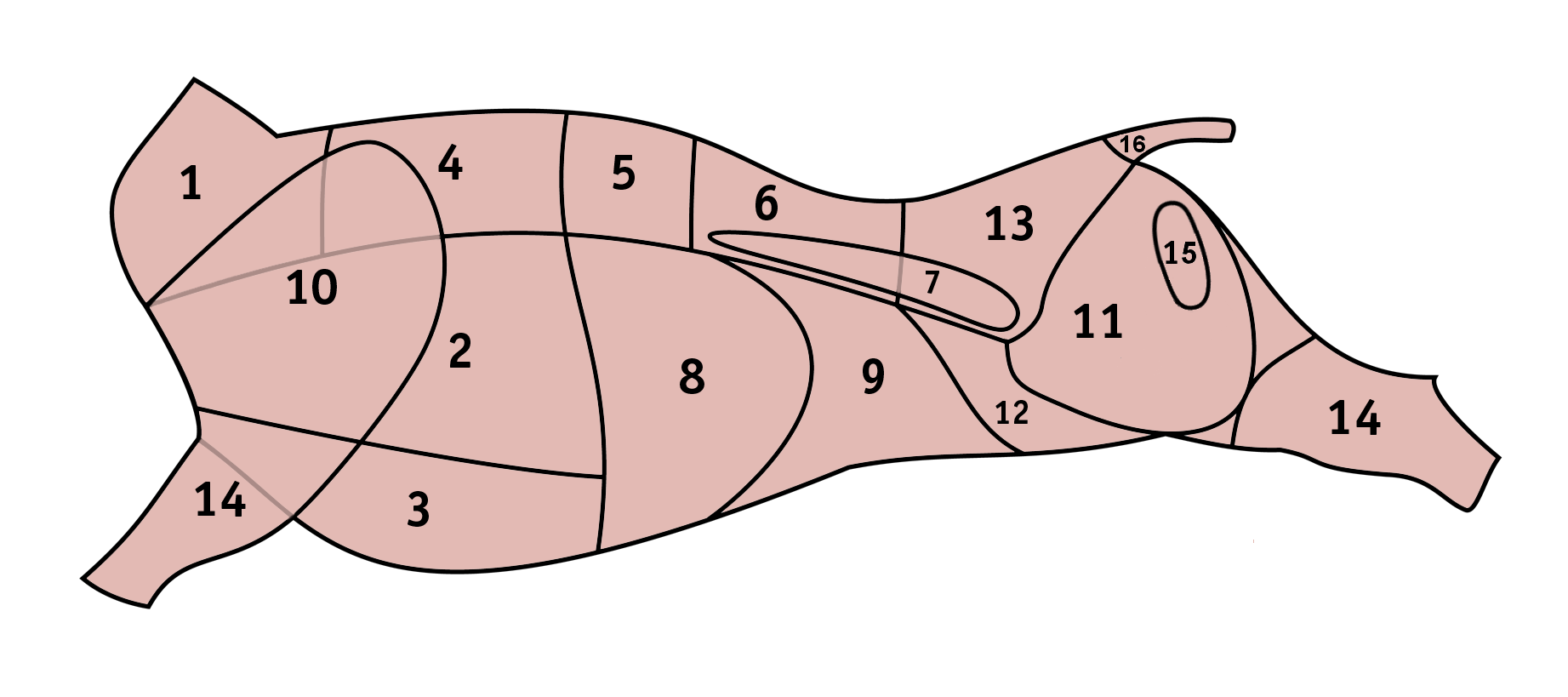 Schnittführung beim Rind. 1. Rinderhals, Kamm oder Nacken 2. Querrippe 3. Rinderbrust 4. Hochrippe 5. Vorderrippe oder hohes Roastbeef 6. Rostbraten oder flaches Roastbeef 5. und 6. bilden das Roastbeef oder Zwischenrippenstück 7. Filet 8. Spannrippe 9. Dünnung 10. Schulter, Bug oder Schaufel 11. Oberschale, Unterschale und Nuss 12. Flanke 13. Hüfte mit Hüftsteak und Schwanzstück oder Tafelspitz 14. Hesse oder Wade 15. [poln. "ligawa"] 16. Schwanz